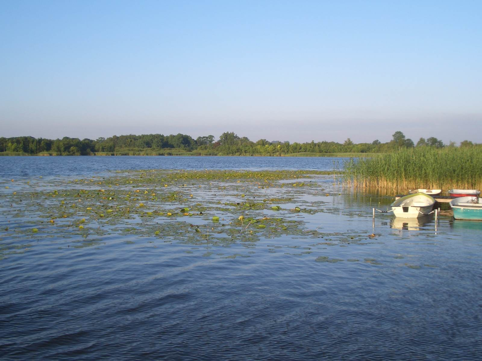 Blick auf den Inselsee und in das Naturschutzgebiet Gutower Moor und Schöninsel bei Güstrow. - Google Maps - Google Earth